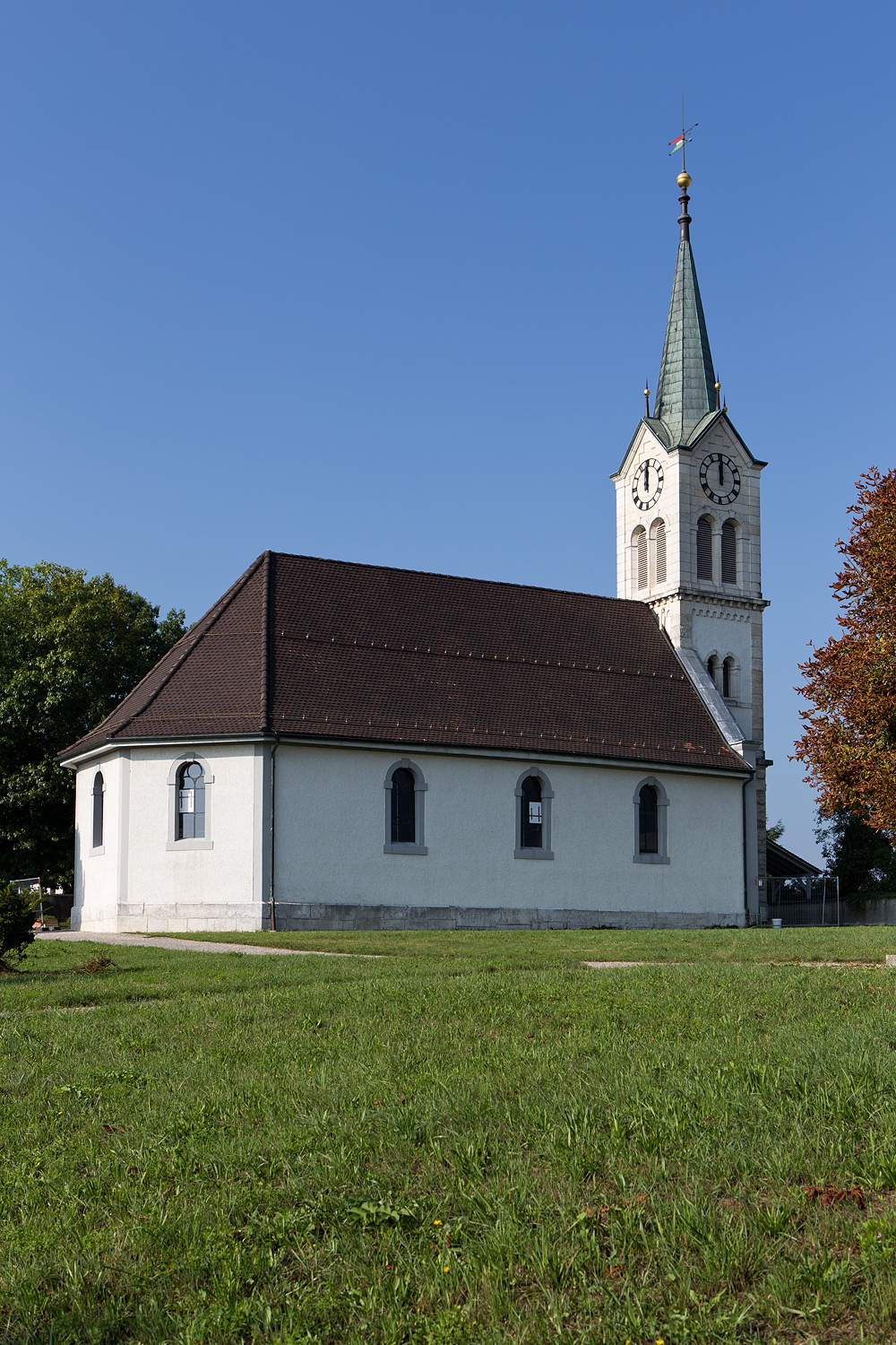 Reformierte Kirche von Rothrist (AG)